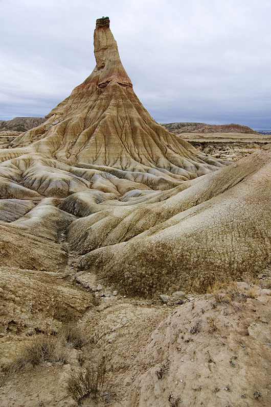 Bardenas Reales, en Navarra. Bardeak, Nafarroan. The Bardenas desert, in Navarre. Spain.